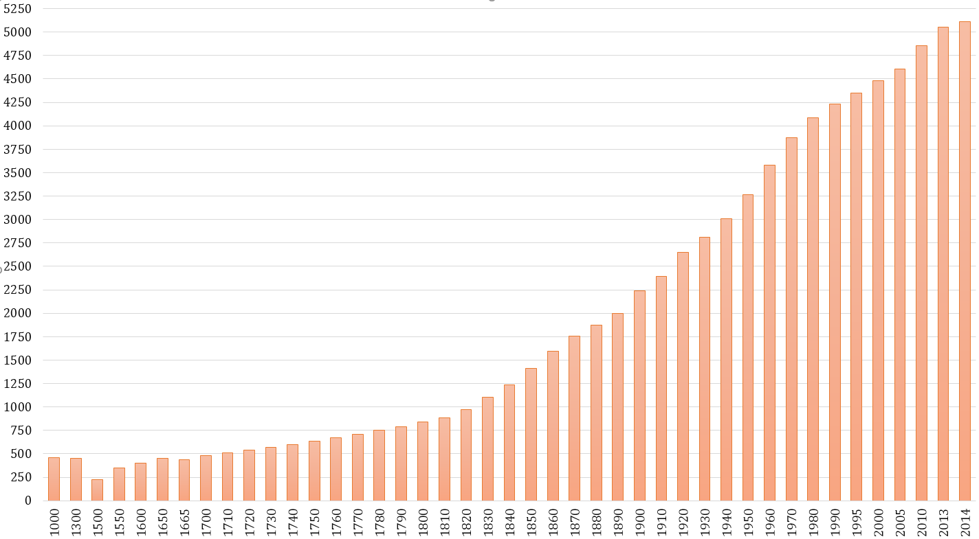 Население Норвегии 1000-2014